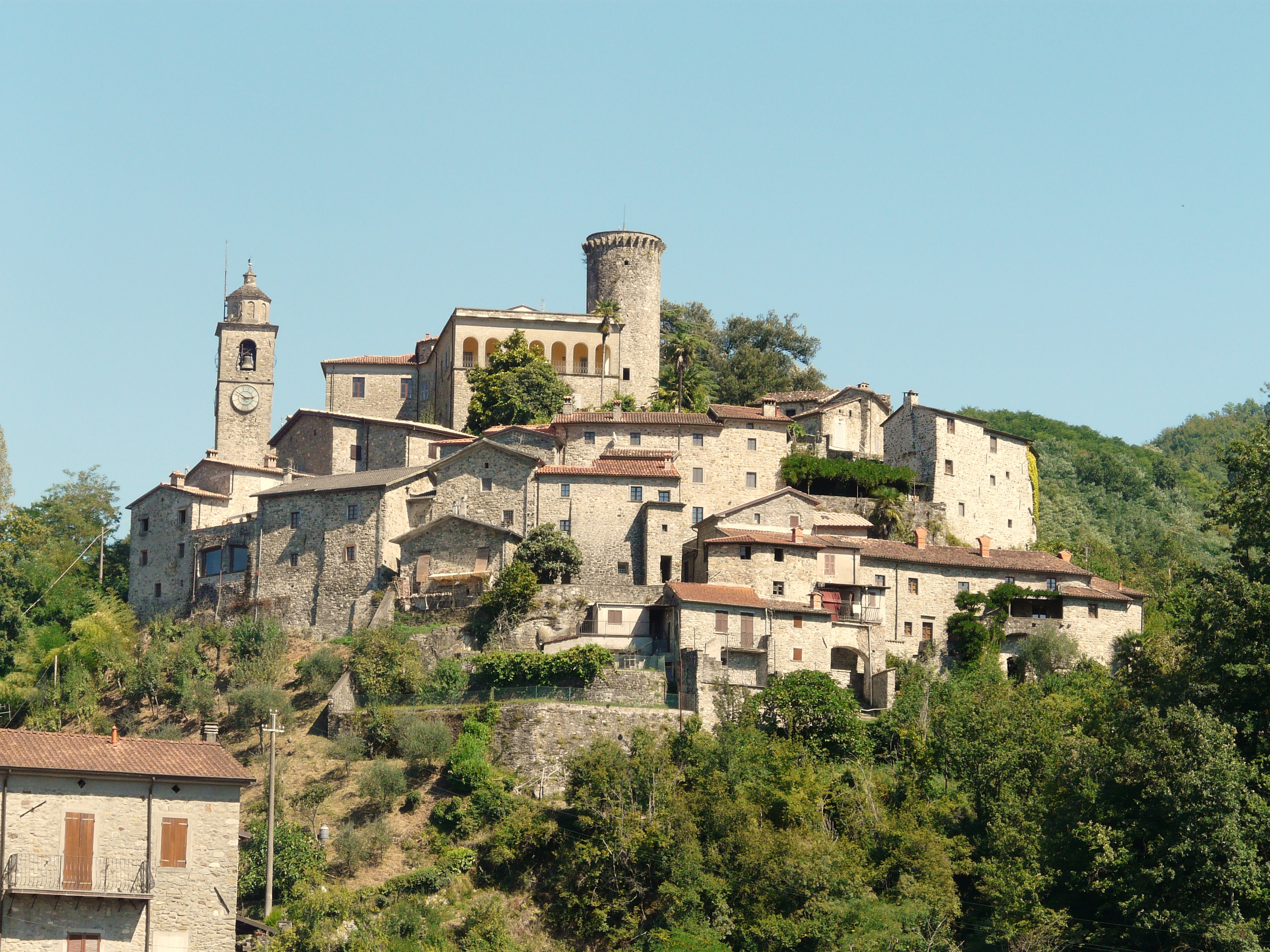 Panorama del castello di Bagnone, Toscana, Italia